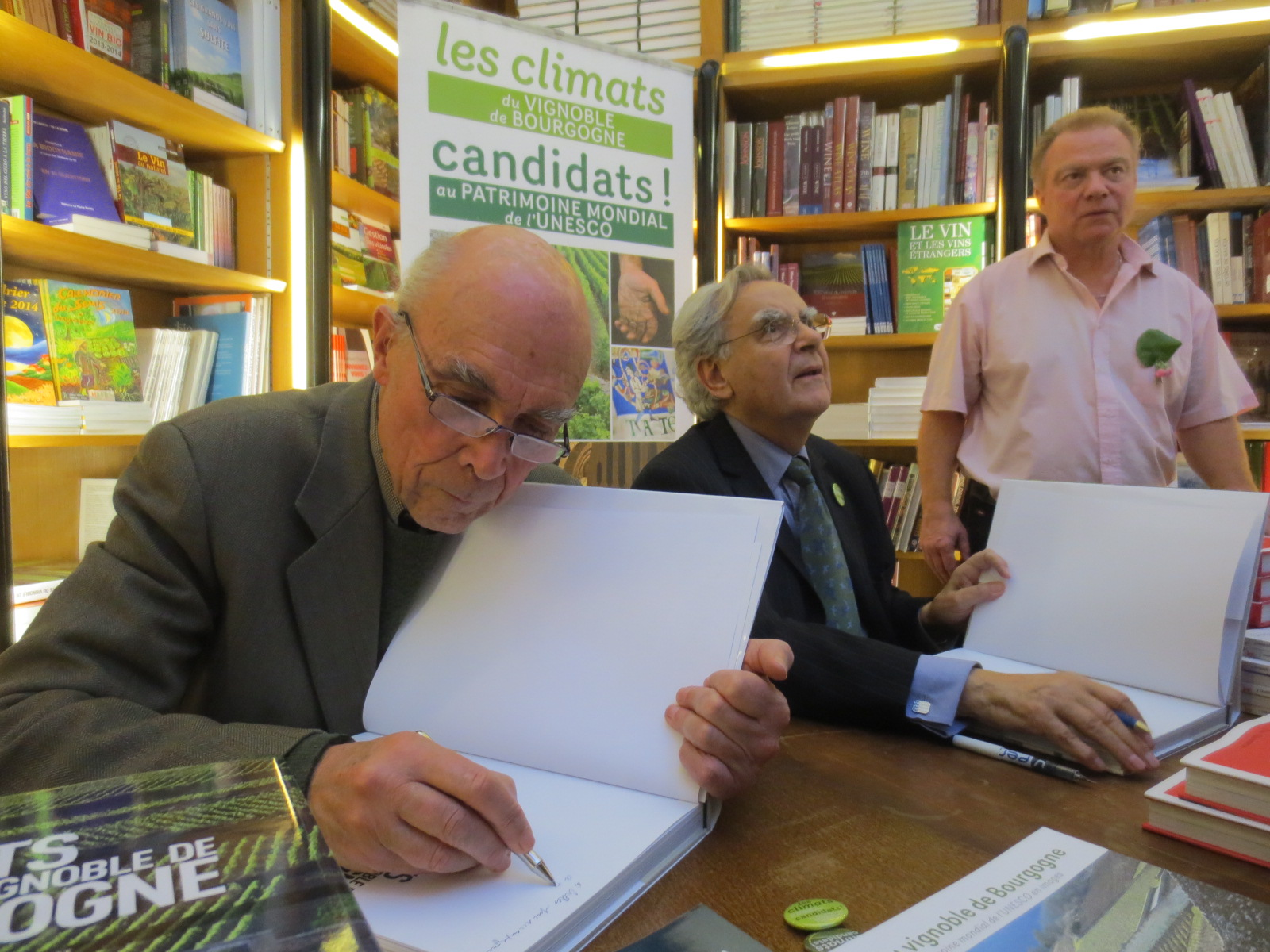 Vente des hospices de Beaune, Aubert de Villaine (viticulteur propriétaire des Romanée Conti) et de Bernard Pivot